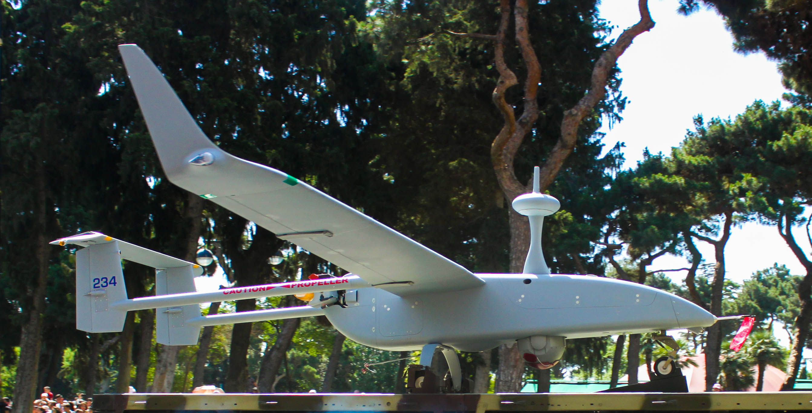 Military parade 2018